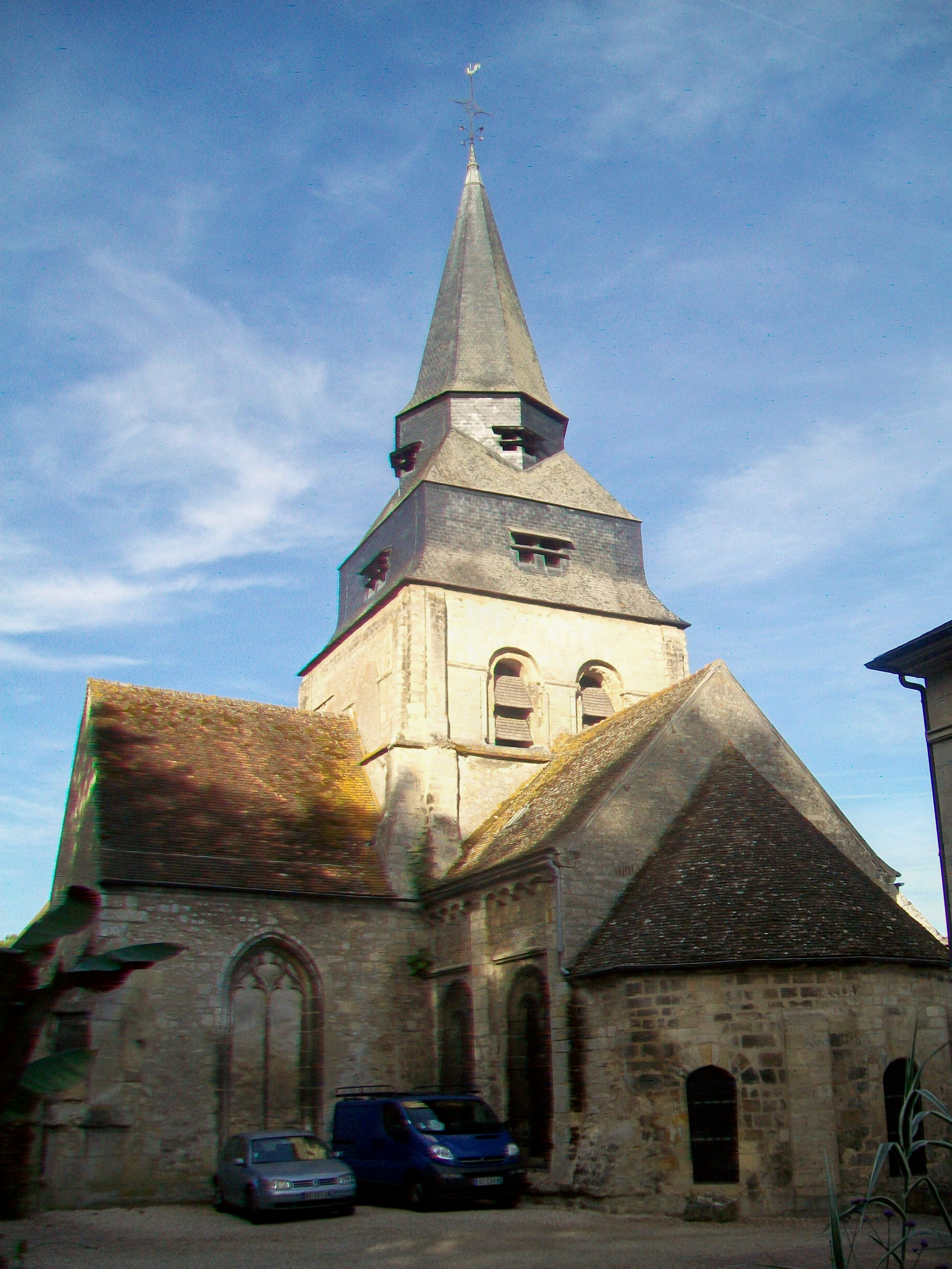 La façade est ; vue depuis le jardin derrière la mairie. Les falaises surplombant l'église et la mairie plongent ce lieu dans une pénombre quasiment permanent.